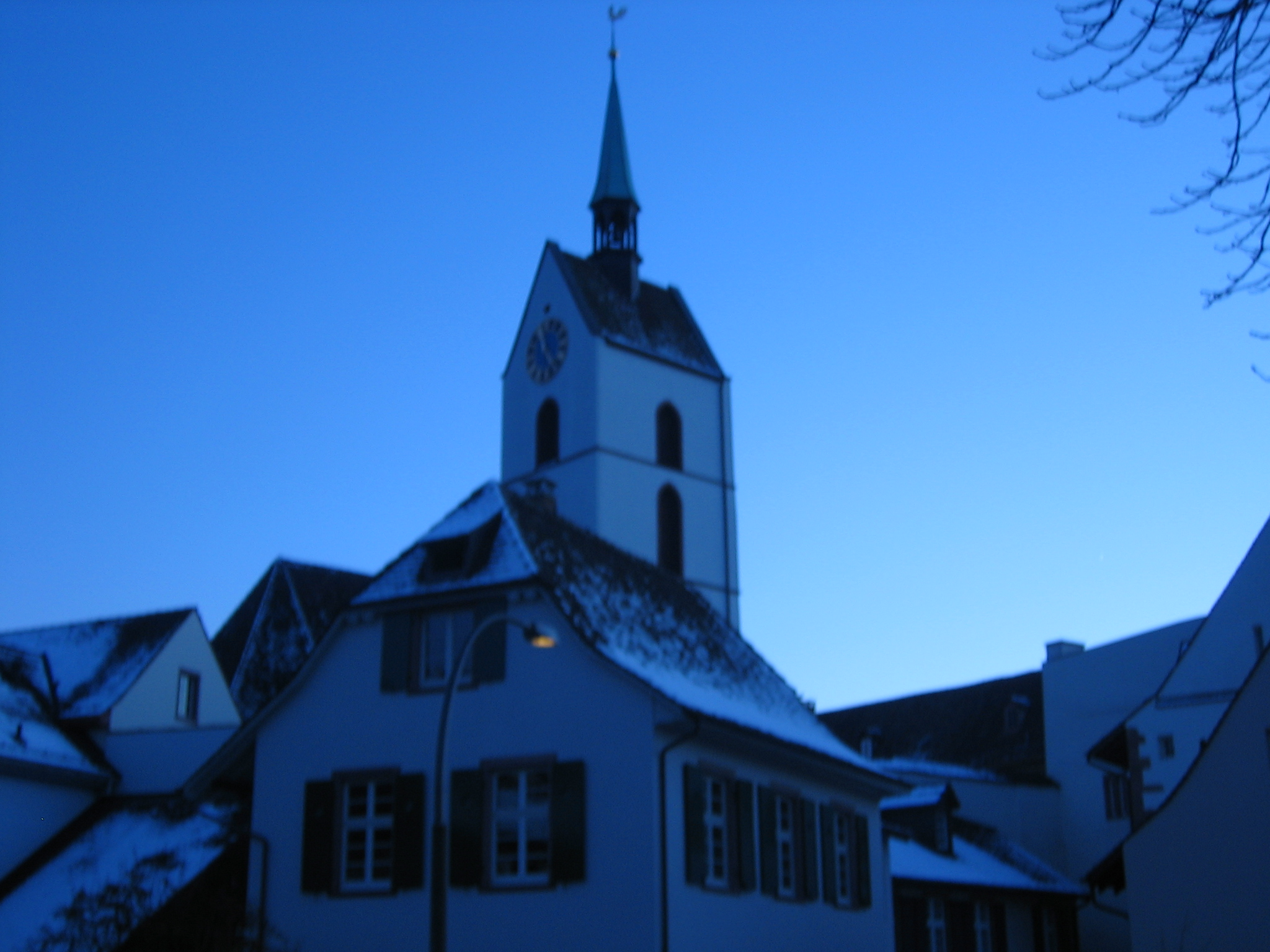 Dorfkirche Riehen, abends. Selbst geschossen im November 2005 Sämi Leder, Riehen